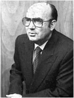 Benjamín Prado Casas, abogado y político chileno. Senador entre 1965 y 1973.